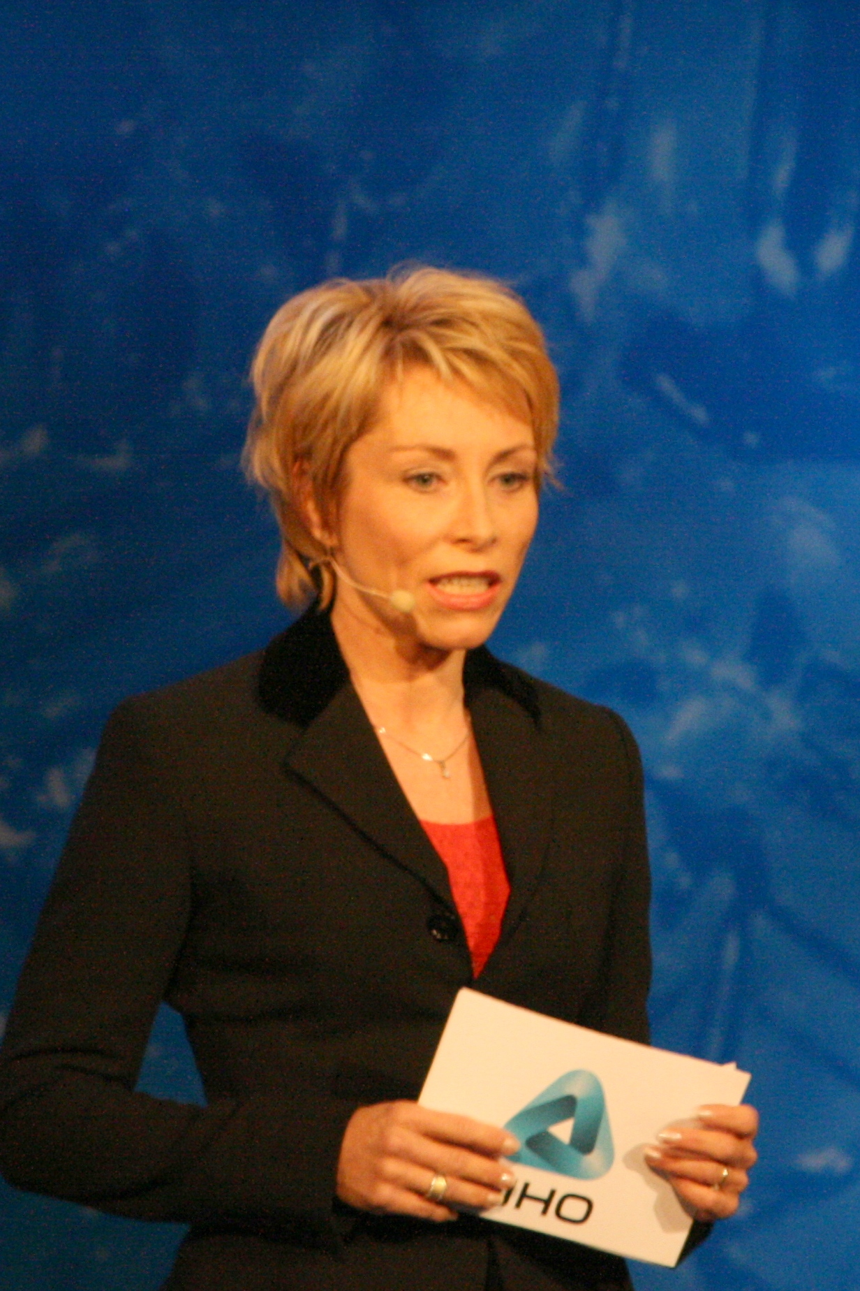 Bente E. Engesland, journalist og redaktør. Fra NHOs Årskonferanse 2009.